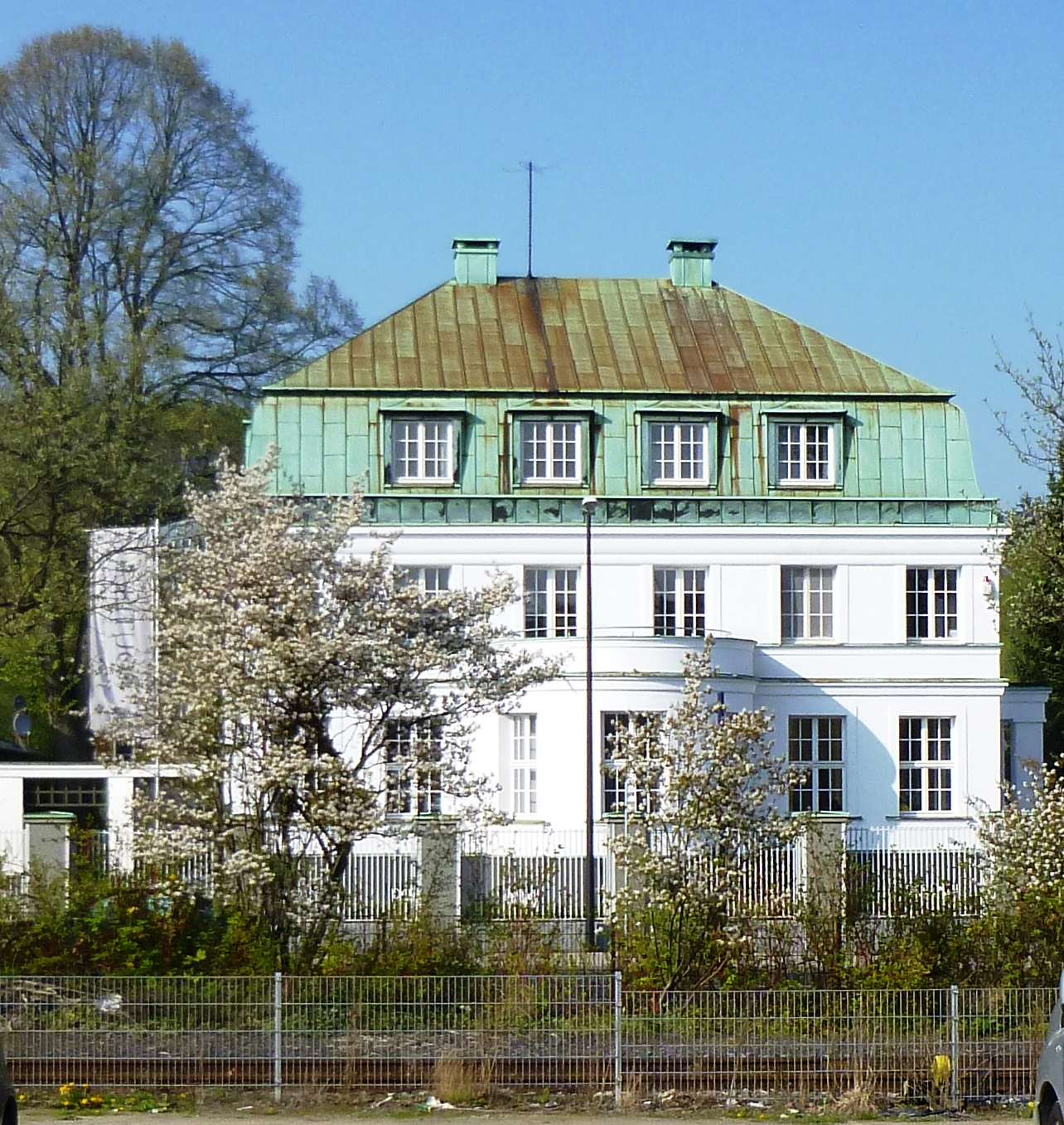 Villa Westermann an der Bahnhofstraße in Hüsten